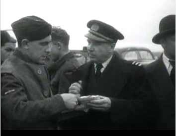 Gerrit Geysendorffer, Nederlands luchtvaartpionier.